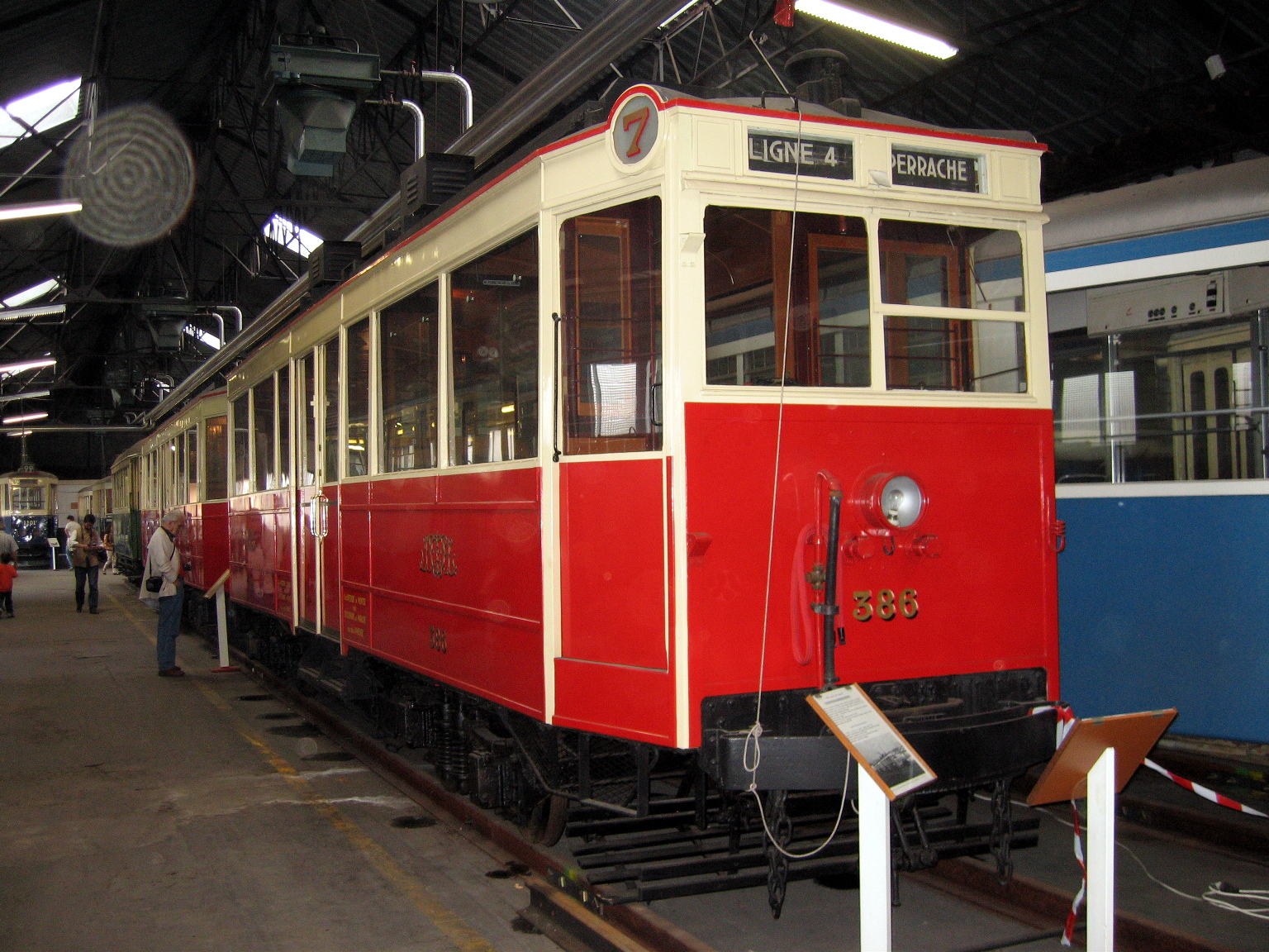 Tramway historique de Lyon à l'AMTUIR 15/09/2007.